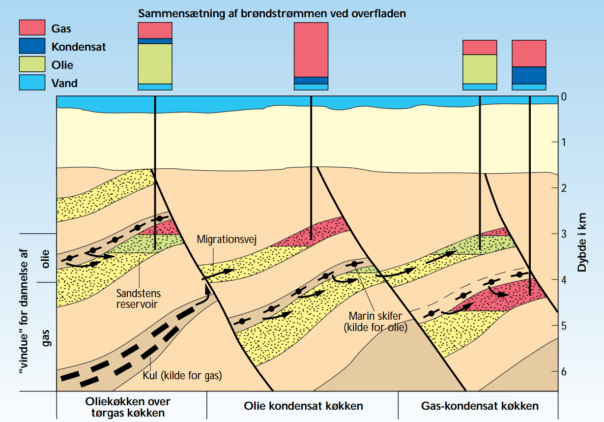 Eksempler på kulbrinte-køkkener